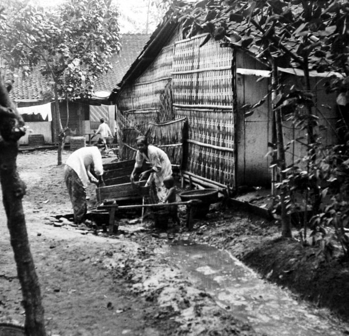 Repronegatief. Karang Anjer, vrouwen bij de waterput